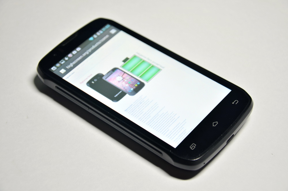 Highscreen Boost - смартфон с аккумулятором, большая емкость которого обеспечивает до 7 дней работы без подзарядки